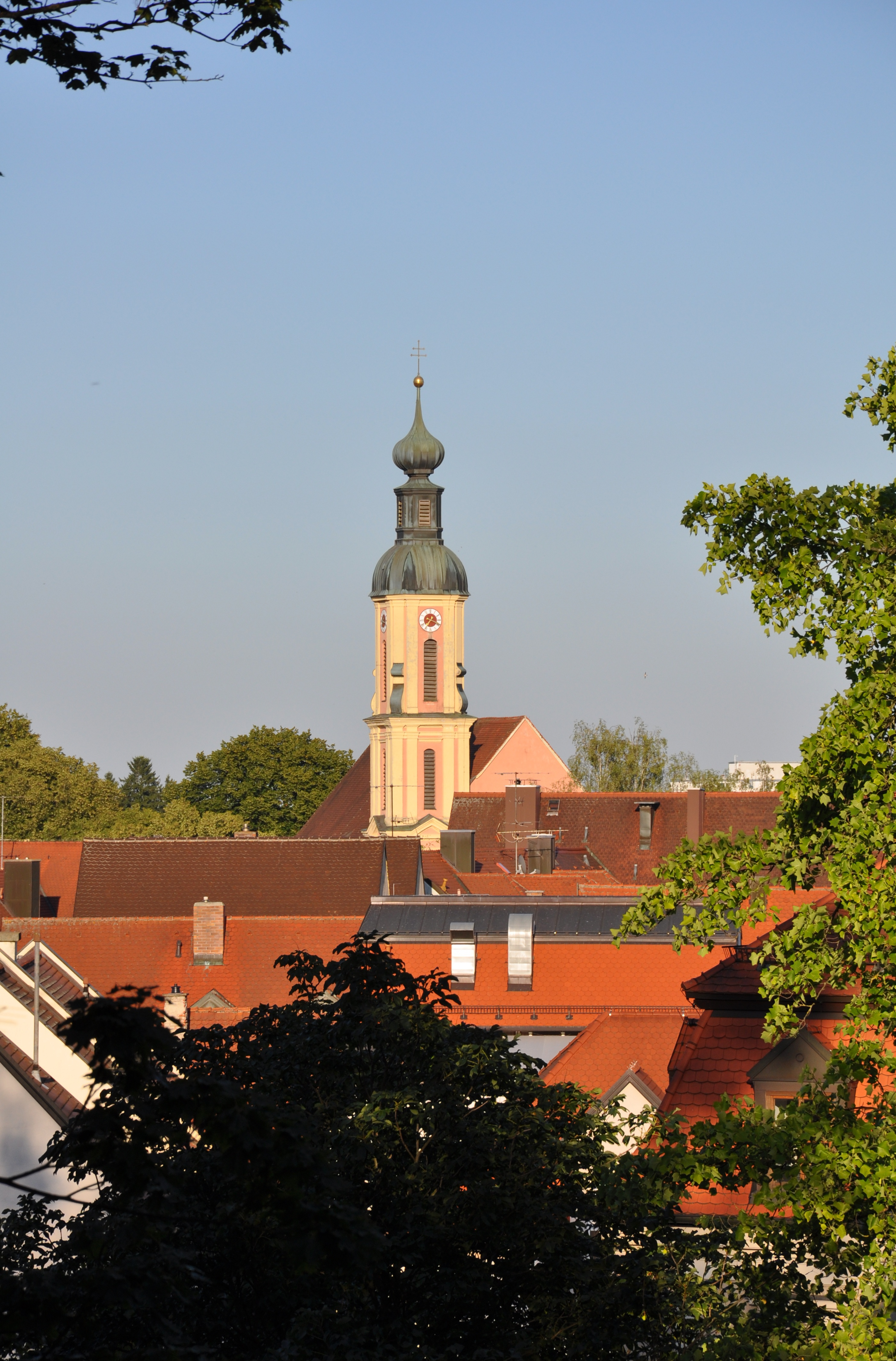 Neuburg an der Donau, Blick von der Altstadt auf die Pfarrkirche Heilig Geist